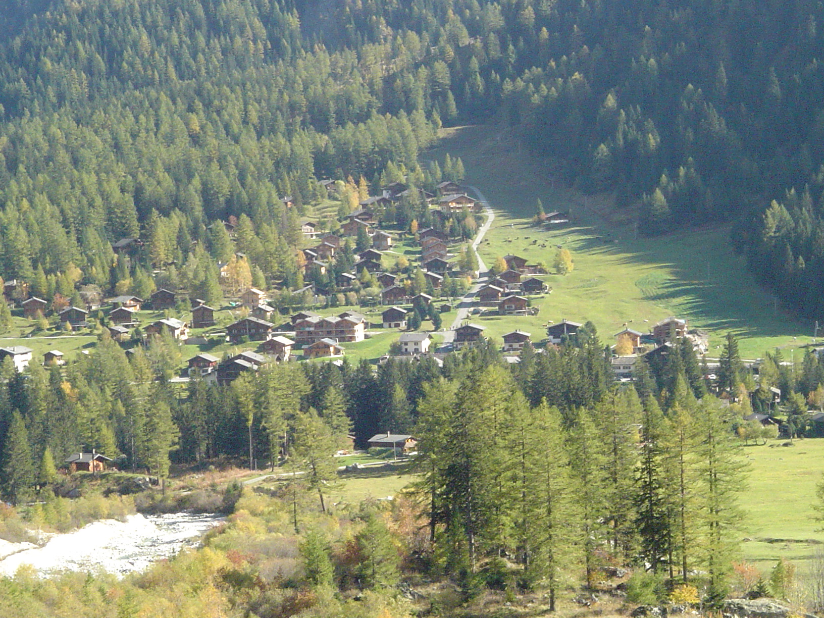 Photo du village de La Fouly